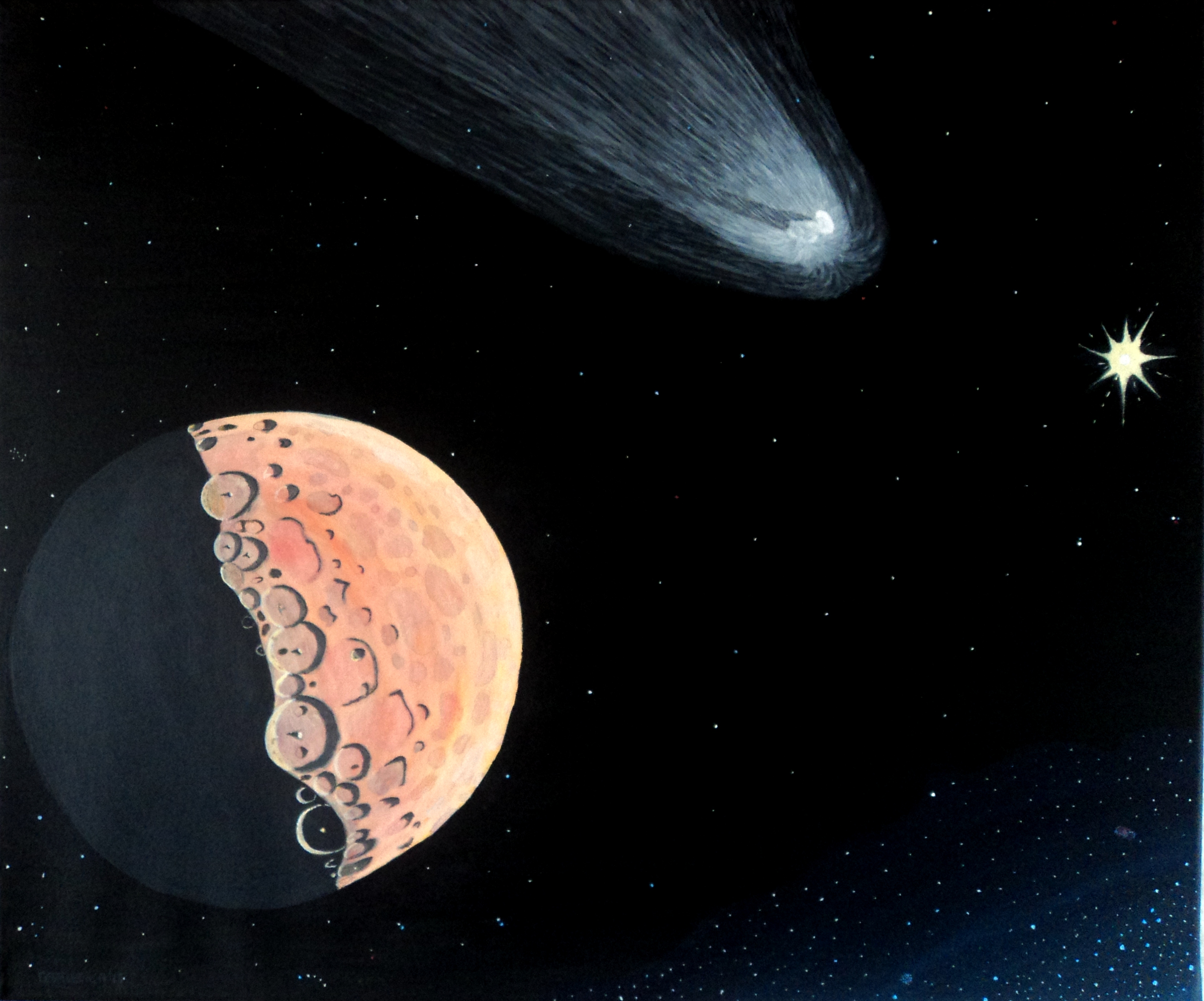 EL PLANETA ENANO CERES Y EL COMETA CHURYUMOV-GERASIMENKO (67/P). El color de Ceres en el espectro visible, es decir como se lo observaría a simple vista y en gamas de color rojizo-anaranjado-rosado y esto dada su gran cantidad de minerales que contienen hierro (cronstedtite) y carbón mineral (dolomite and siderite) o condritos como en otros asteroides o meteoritos. El cometa es el 67P/Churiumov-Guerasimenko ya en actividad desarrollando su cola de gases y polvo. Ambos astros recientemente visitados por sondas espaciales, la “Dawn” (amanecer) a Ceres y “Rosetta” al cometa 67P/Churiumov-Guerasimenko. Mi última pintura al acrílico y sobre lienzo. Villa Gesell. 22.03.2015.